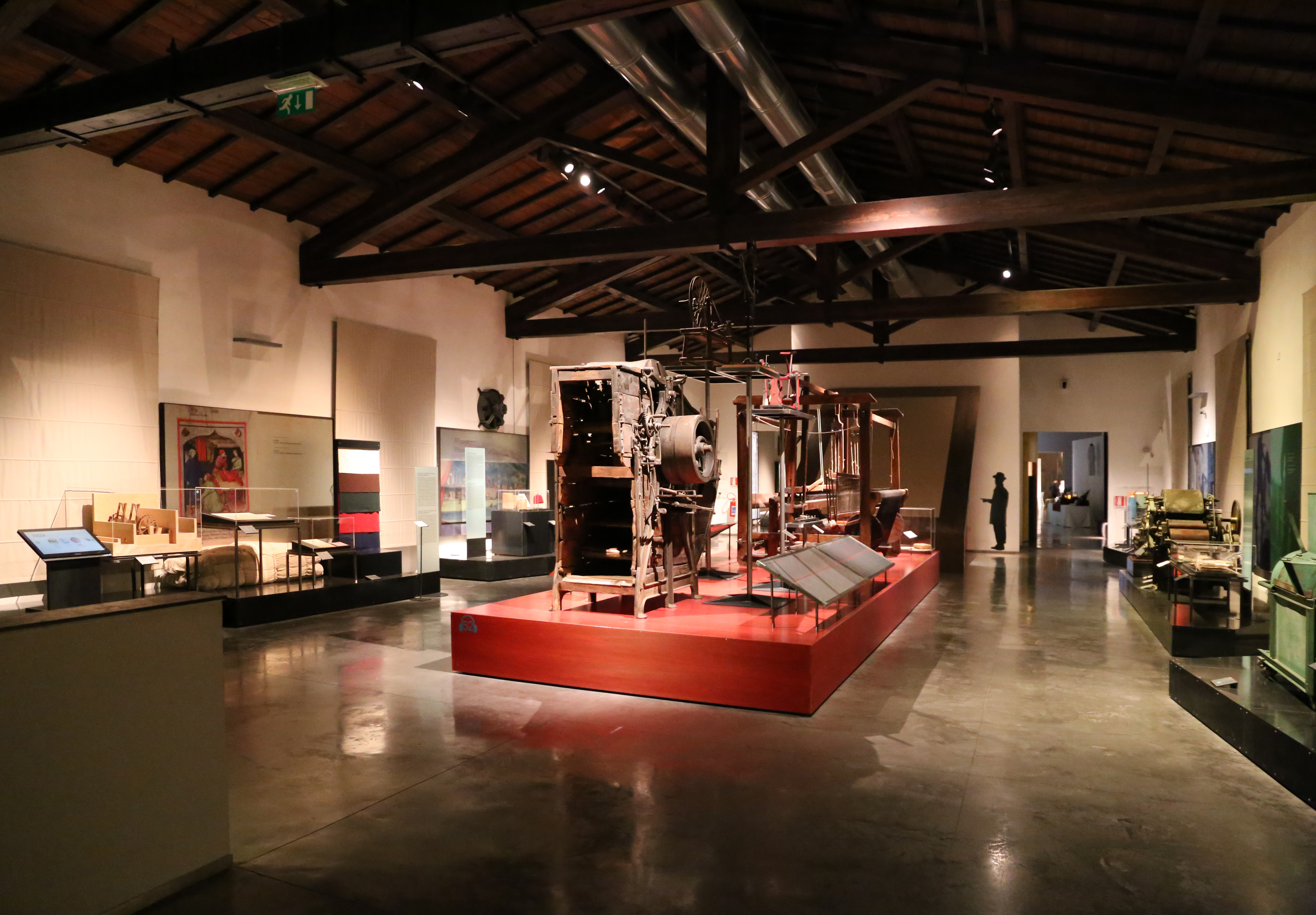 Museo del tessuto This is a photo of a monument which is part of cultural heritage of Italy.